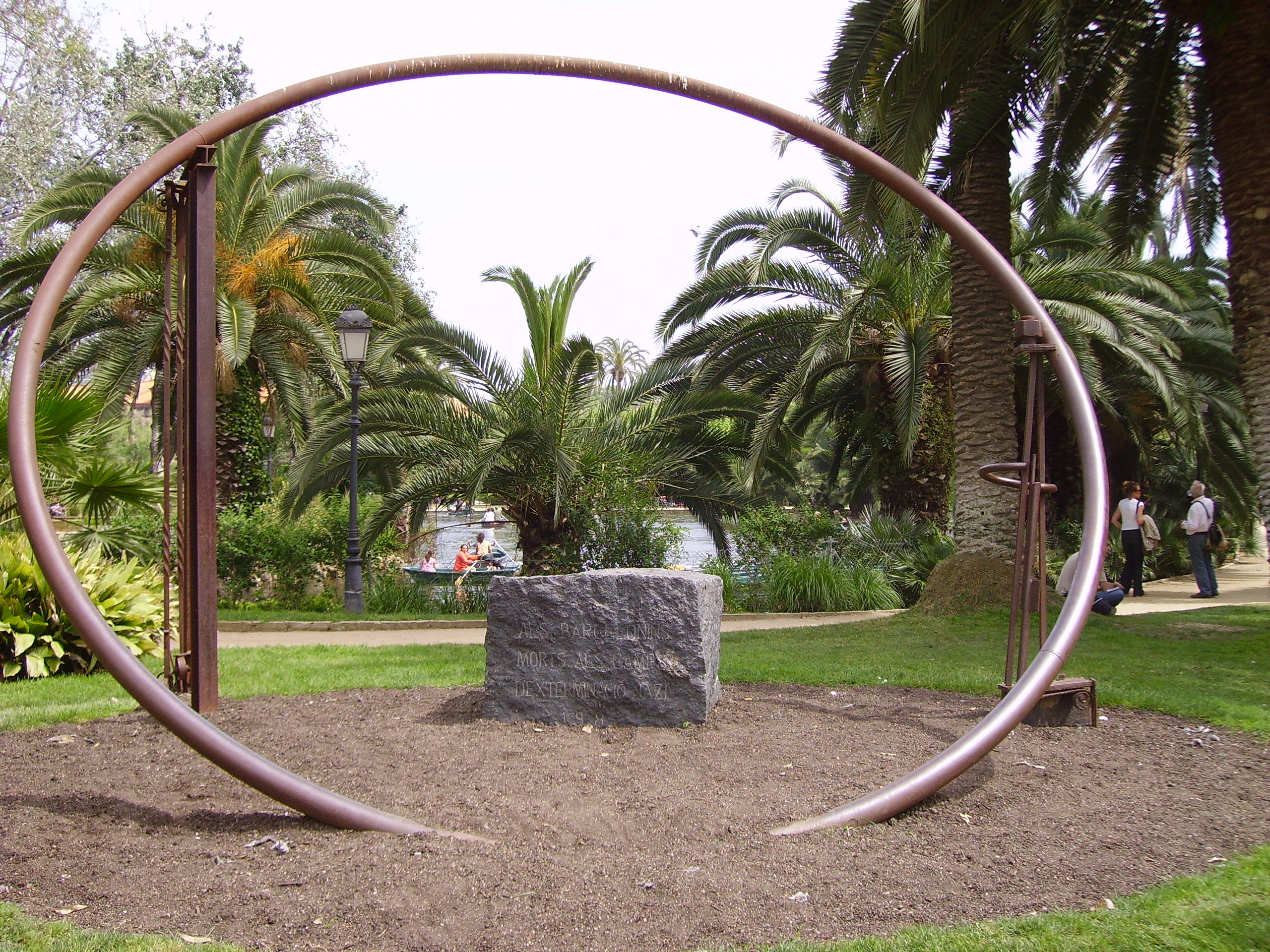 Obra d'André Fauteux: "Als barcelonins morts als camps d'extermini nazi", Parc de la Ciutadella, Barcelona, Catalunya